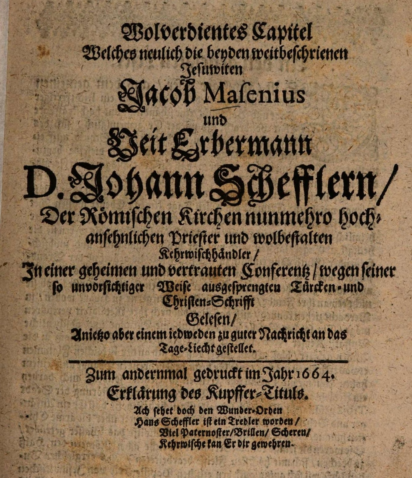 Fiktiv-polemische Schrift eines unbekannten (protestantischen) Verfassers über die Kritik der Jesuiten Jacob Masen und Vitus Erbermann an einer Schrift Johann Schefflers